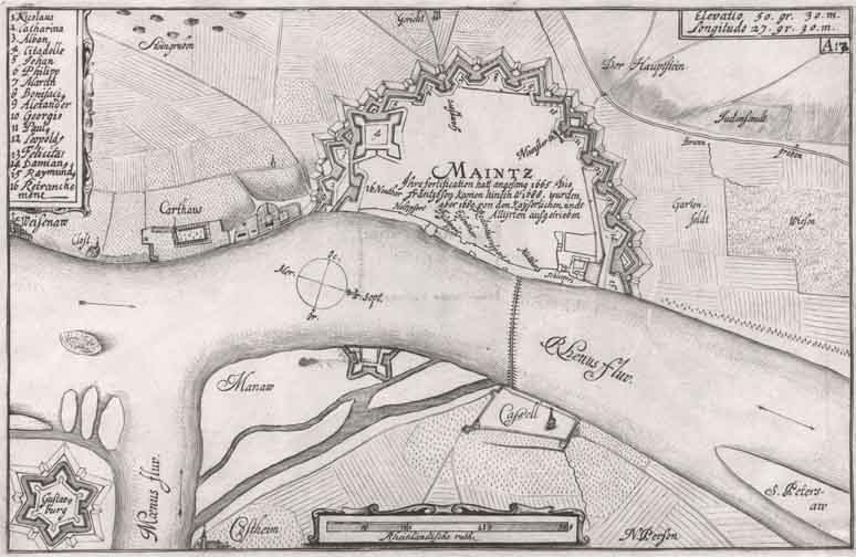 Festung Mainz mit ihren Bastionen, Kuprferstichillustration im Format 27 x 17 cm, die von dem Mainzer Kupferstecher und Verleger Nikolaus Person († 1710) stammt.